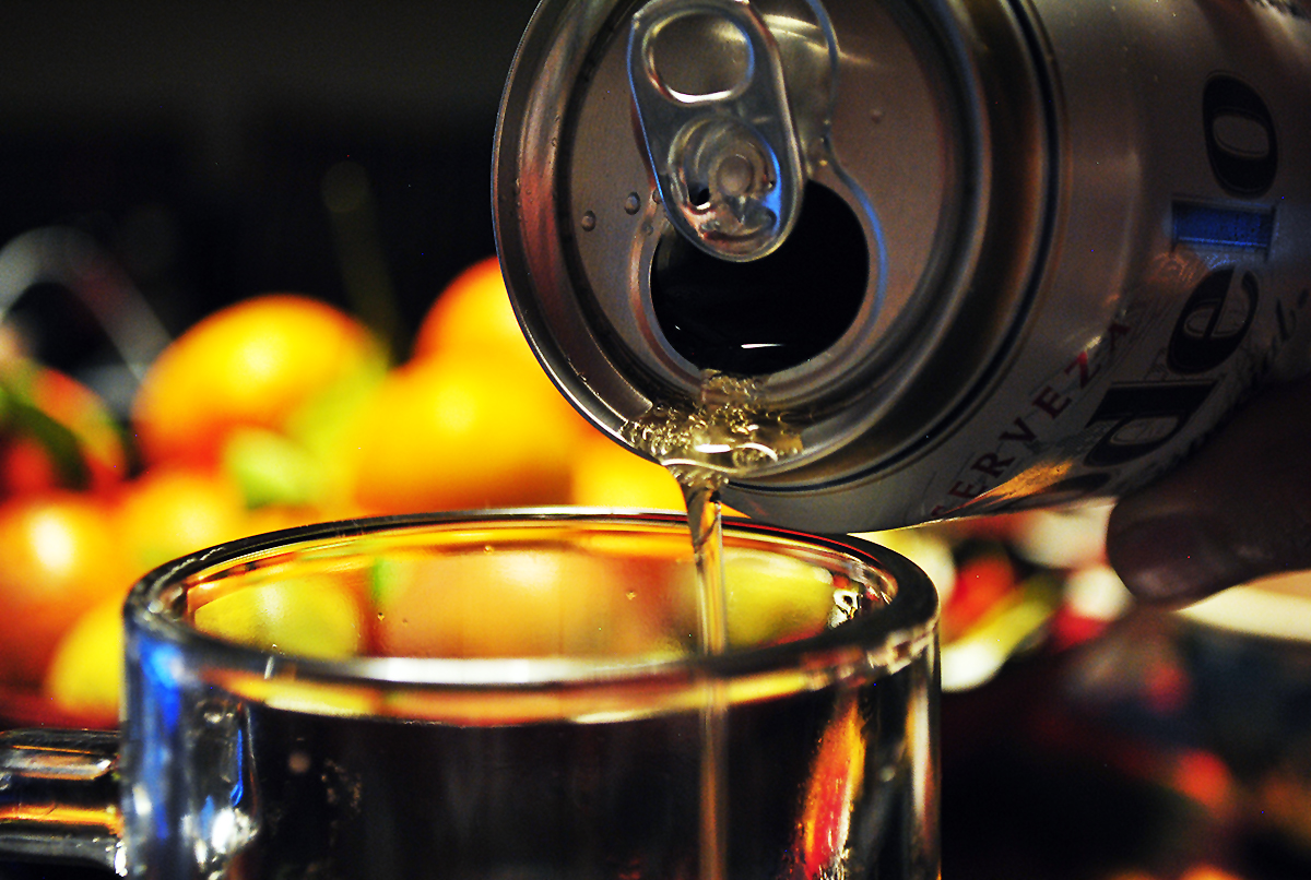 Close up a una lata de cerveza Modelo servida en un tarro.